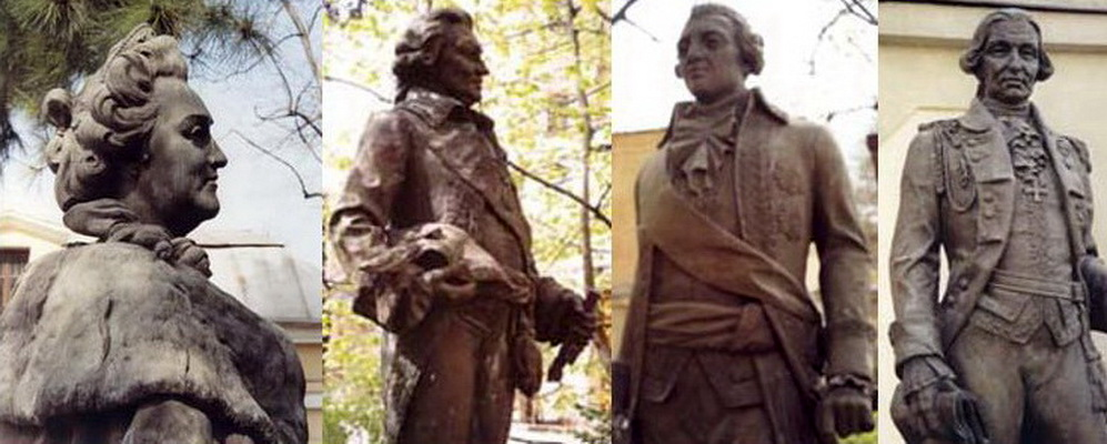 Оригиналы фигур первоначального памятника Основателям Одессы во дворе Краеведческого музея.